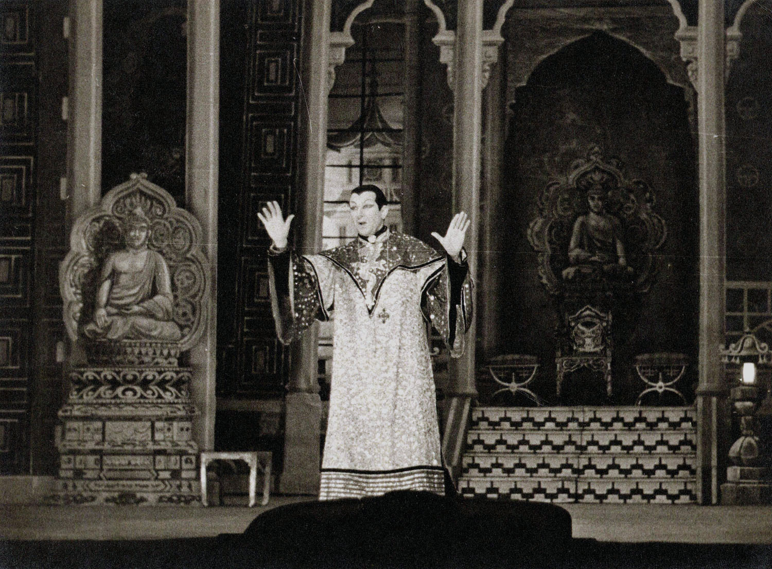 En pleine représentation de "Le pays du sourire"